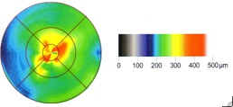 Dicke der Retina eines stark kurzsichtigen Auges